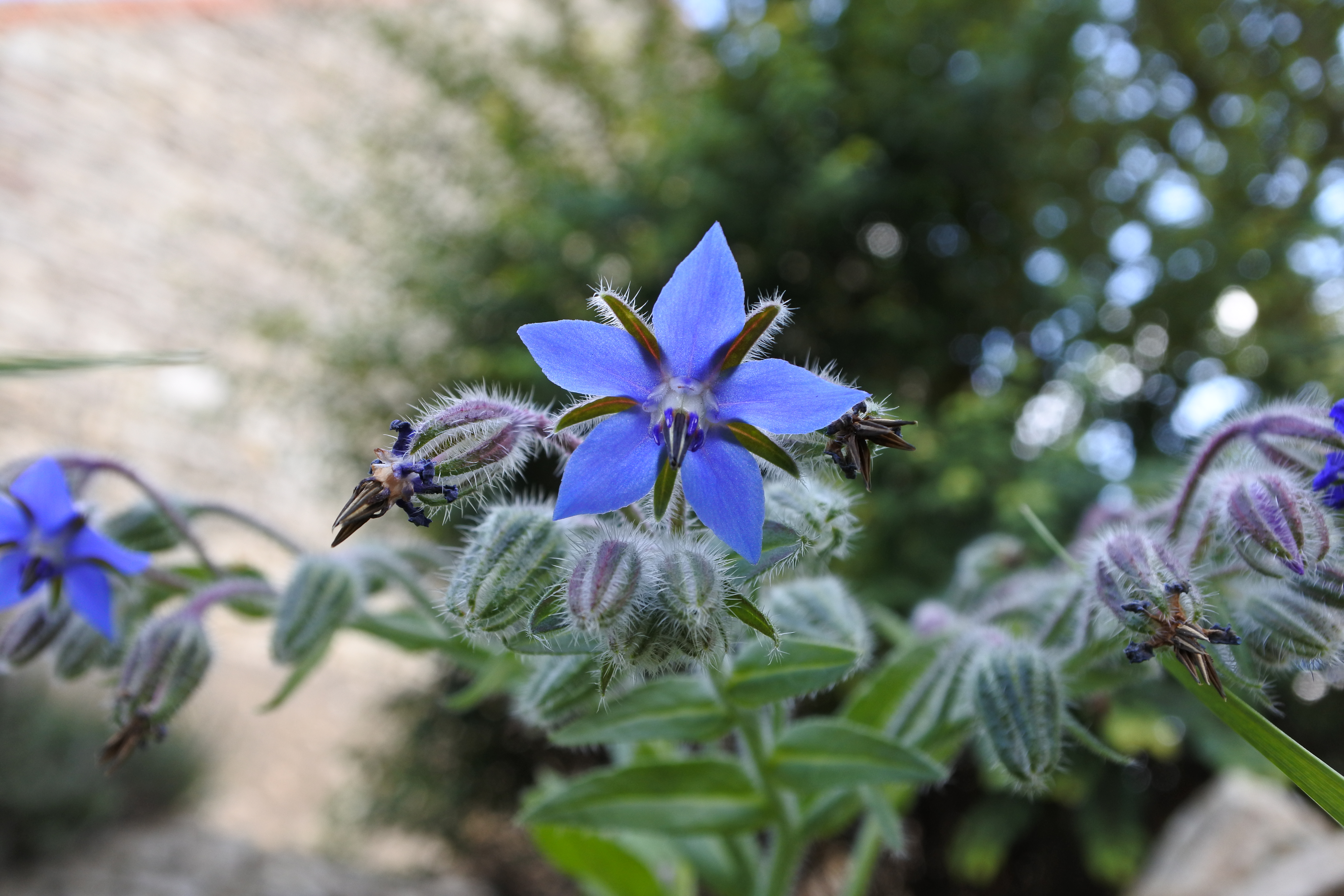 Blüte, Knospen der Borretsch-Pflanze